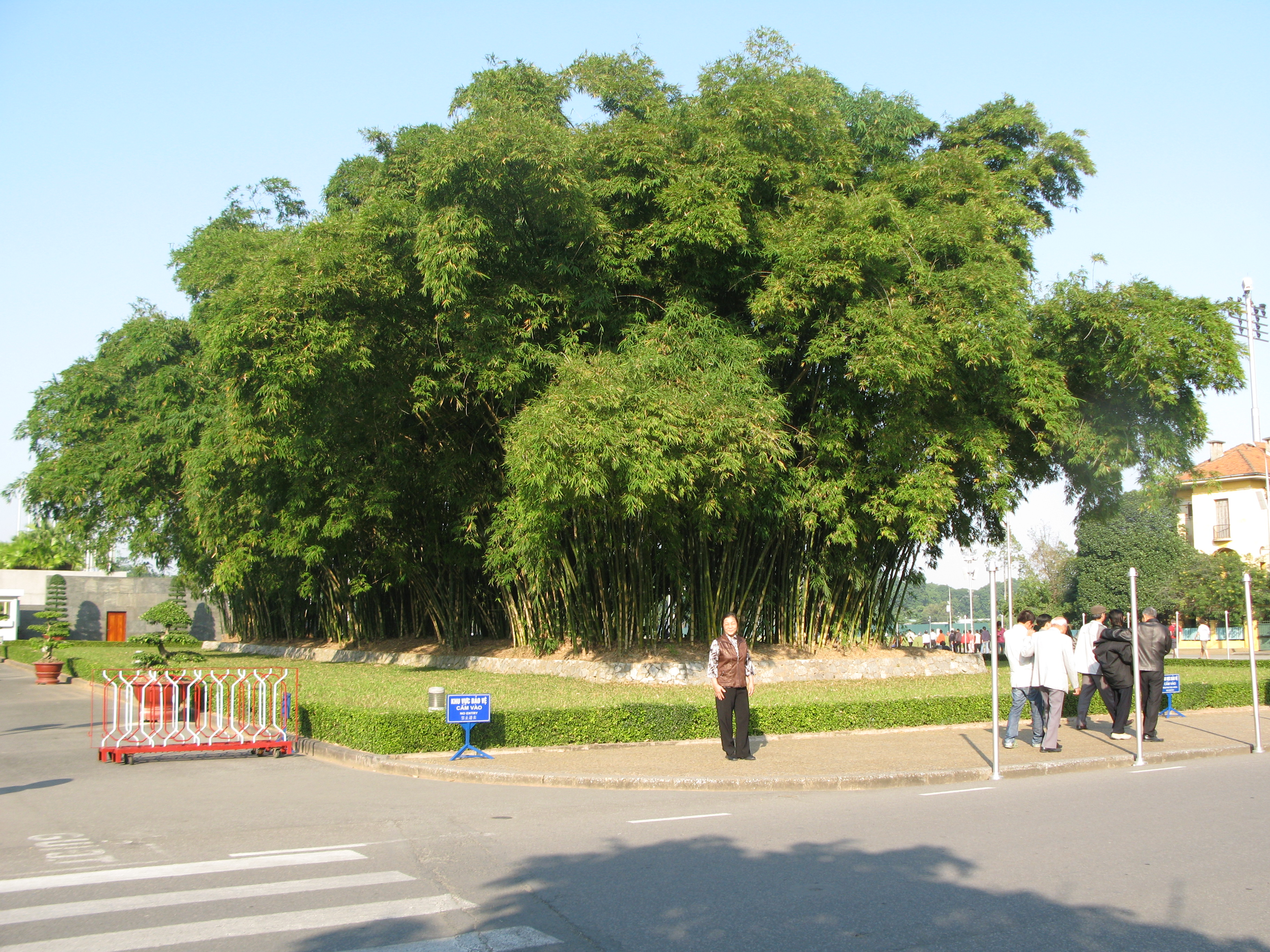 Hàng tre bên cạnh Lăng Hồ Chủ Tịch, Quảng trường Ba Đình, Hà Nội